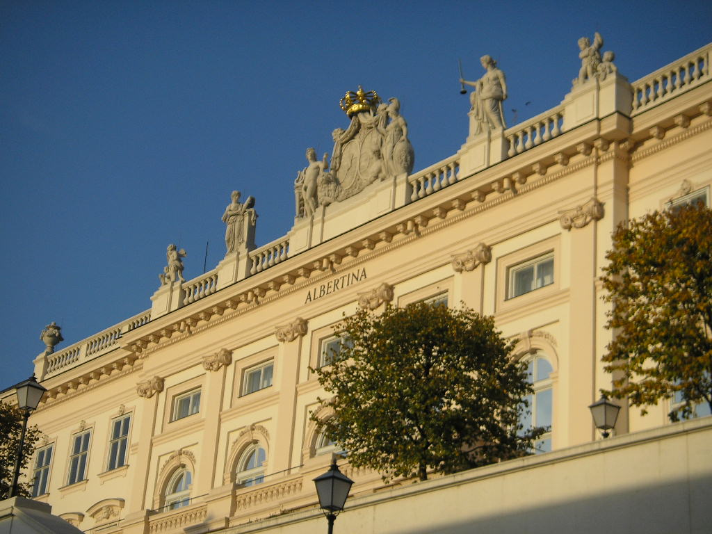 The Albertina, former Palais Erzherzog Albrecht, in Vienna